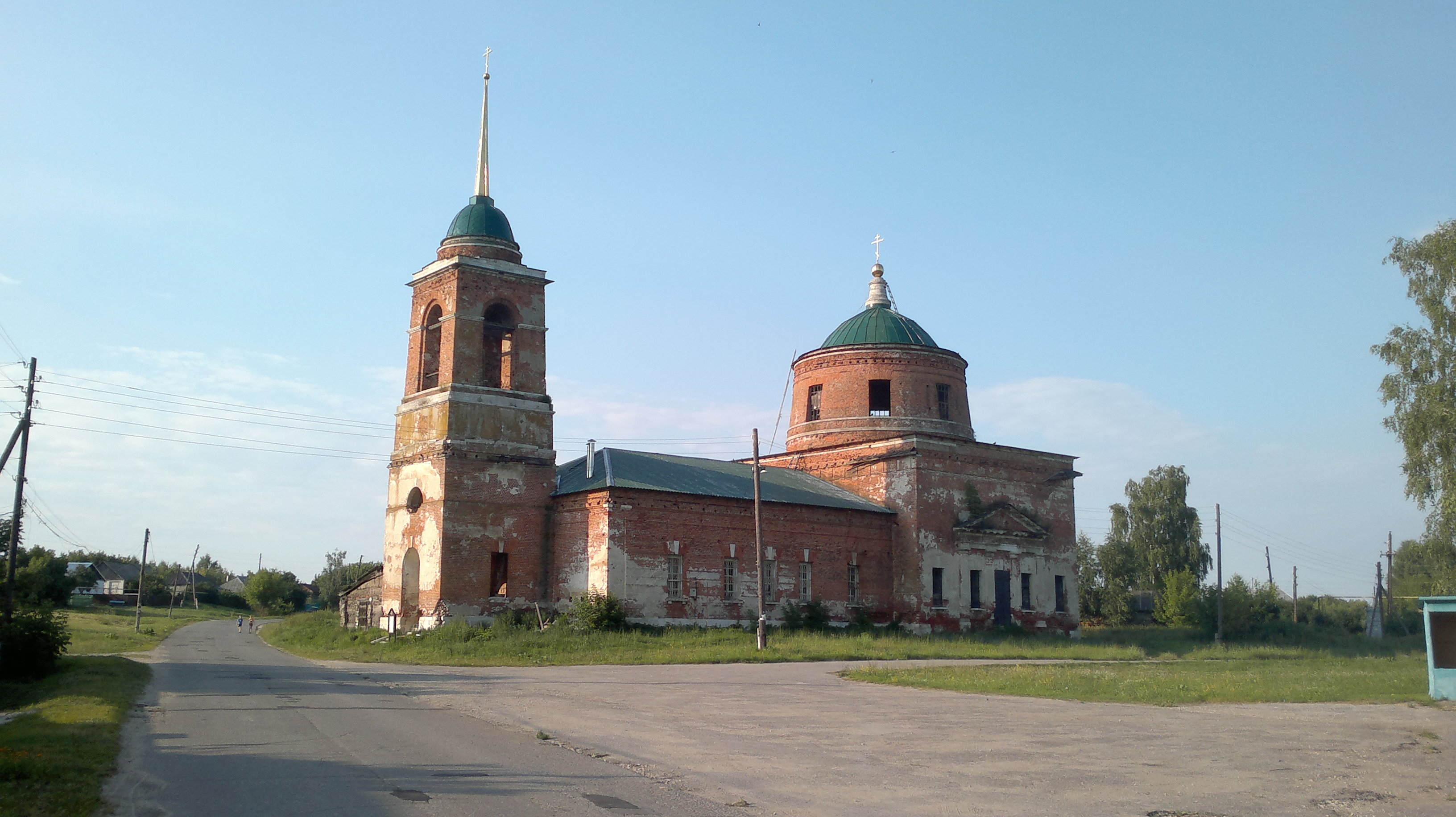 Церковь Иоанна Богослова: Тимошкино, Шиловский район, Рязанская область